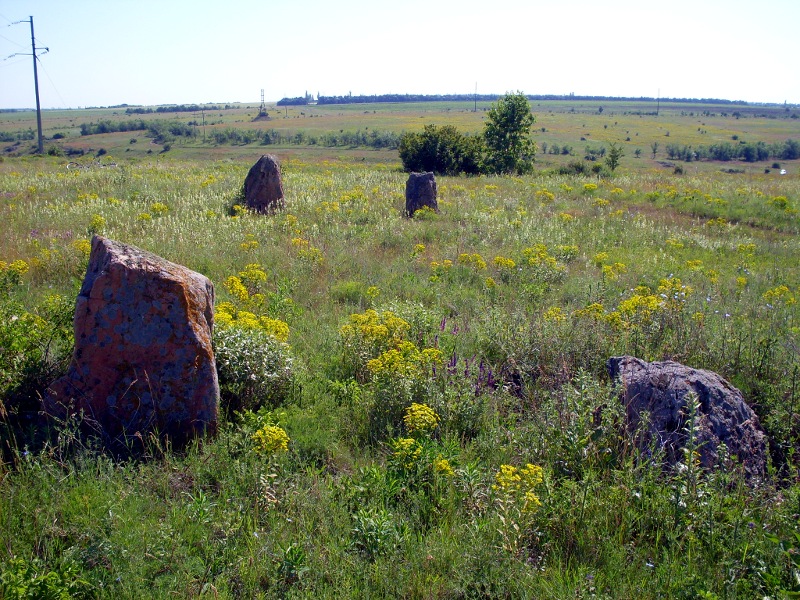 Межевые камни, с. Нечаевка, Компаниевский район, Кировоградская область, Украина